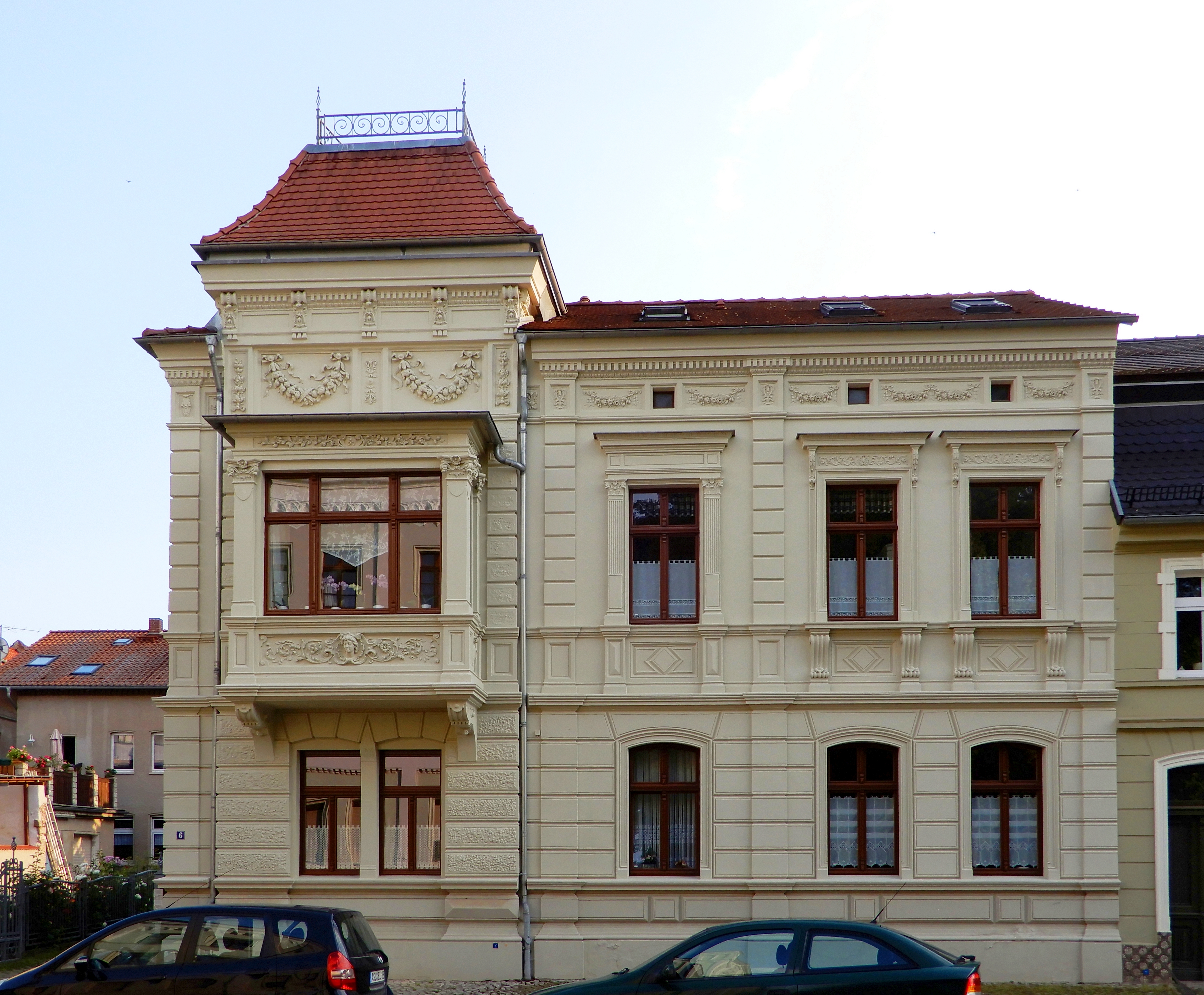 Gebäude Vor dem Wassertor 6 in Aschersleben